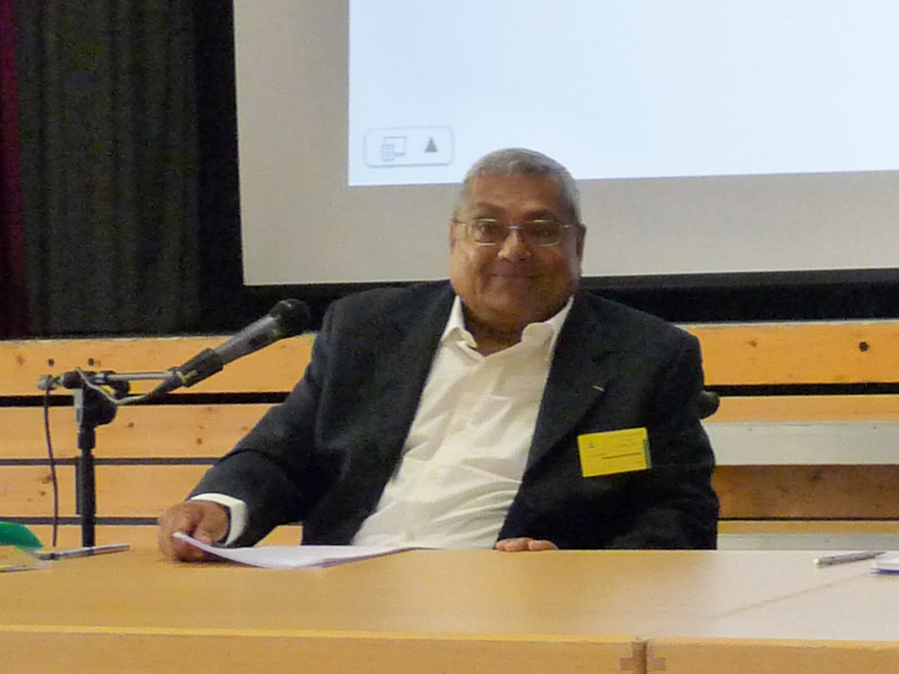 Conférence de Prithwindra Mukherjee (Convergence des théories et pratiques des multiples voies du yoga) lors du 38e congrès de l'Union européenne de yoga à Zinal (Valais, Suisse)